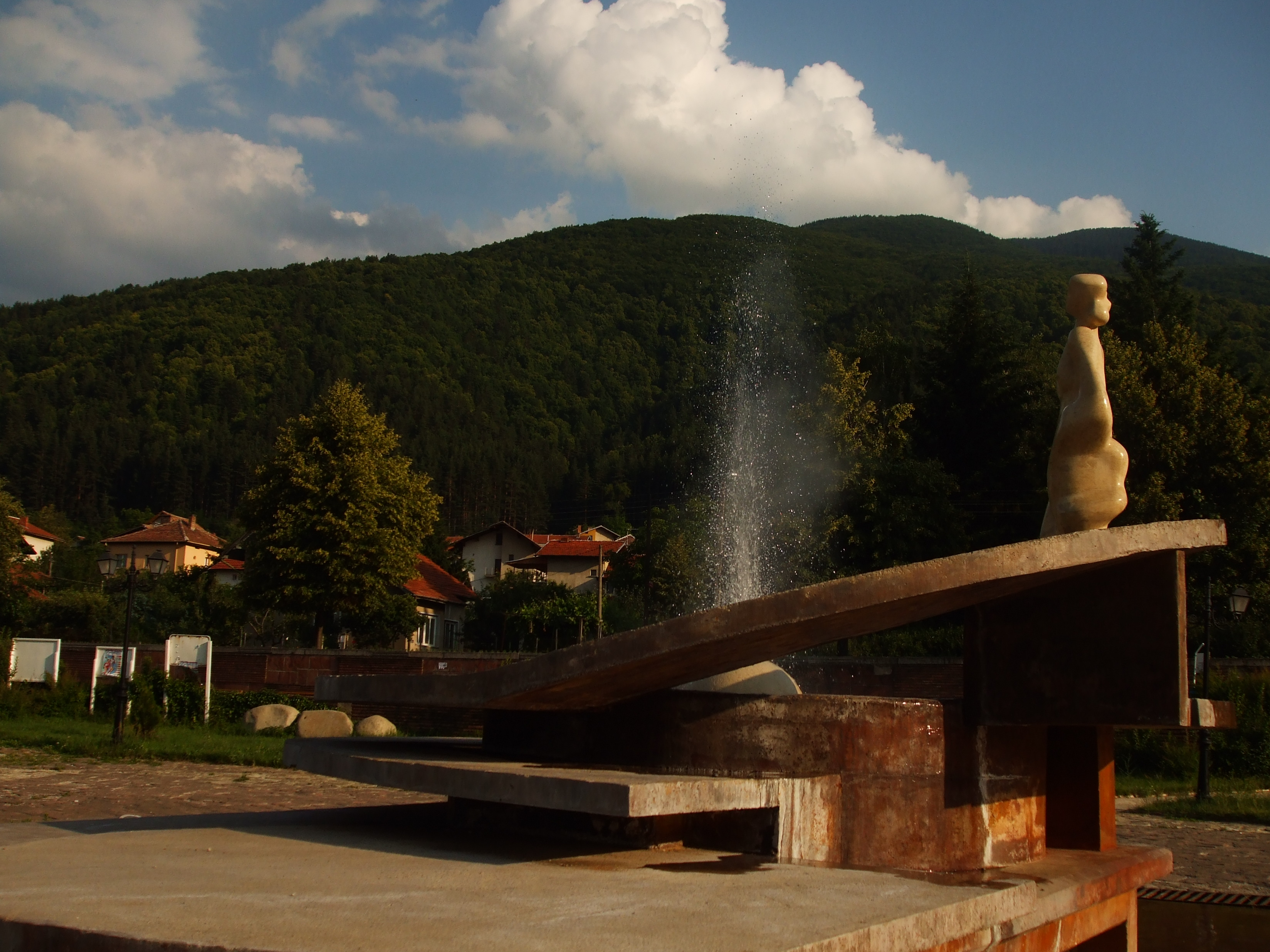 Гейзерът в Сапарева баня